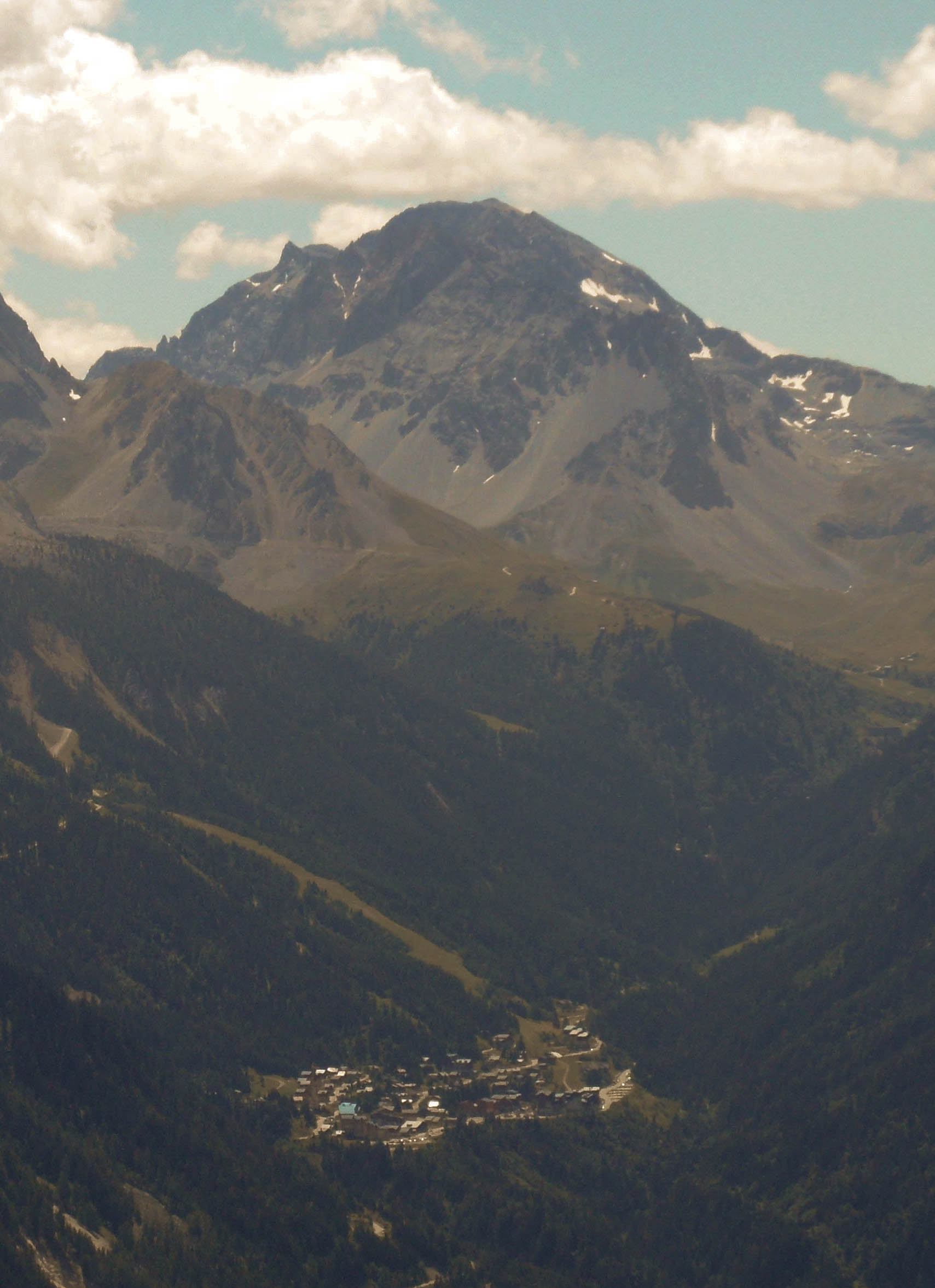 La station de Valfréjus vue depuis la porte de l'Orgère, entrée du parc national de la Vanoise.